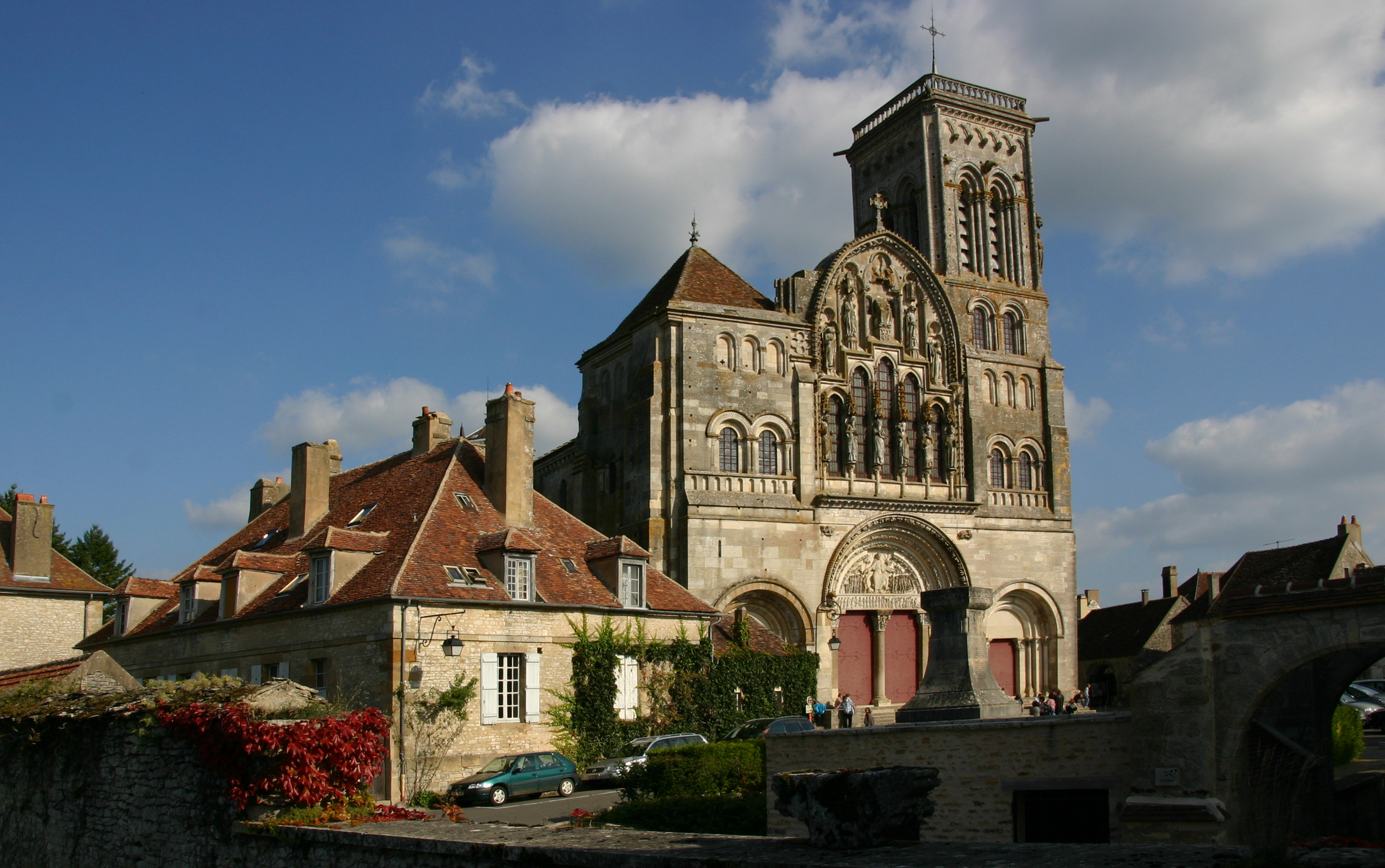 Vézelay, Basilika Sainte-Marie-Madeleine